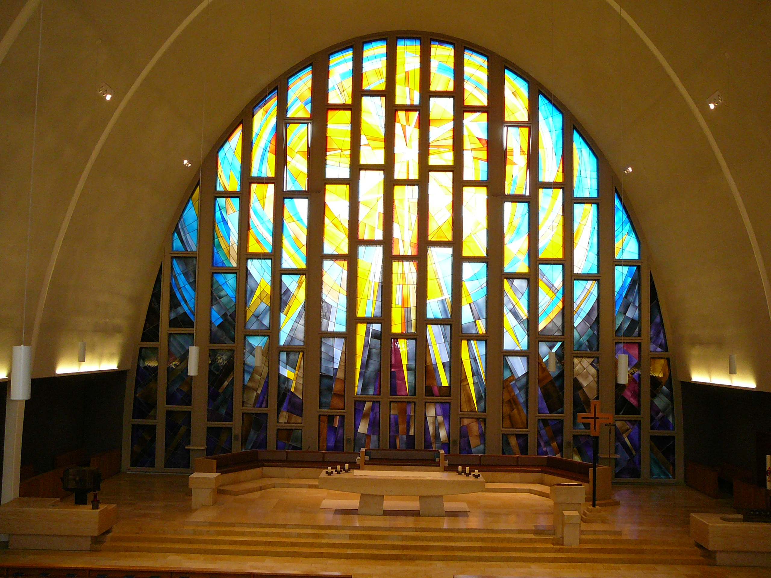 Römisch-katholische Pfarrkirche St. Gallus Zürich-Schwamendingen, Altarfenster